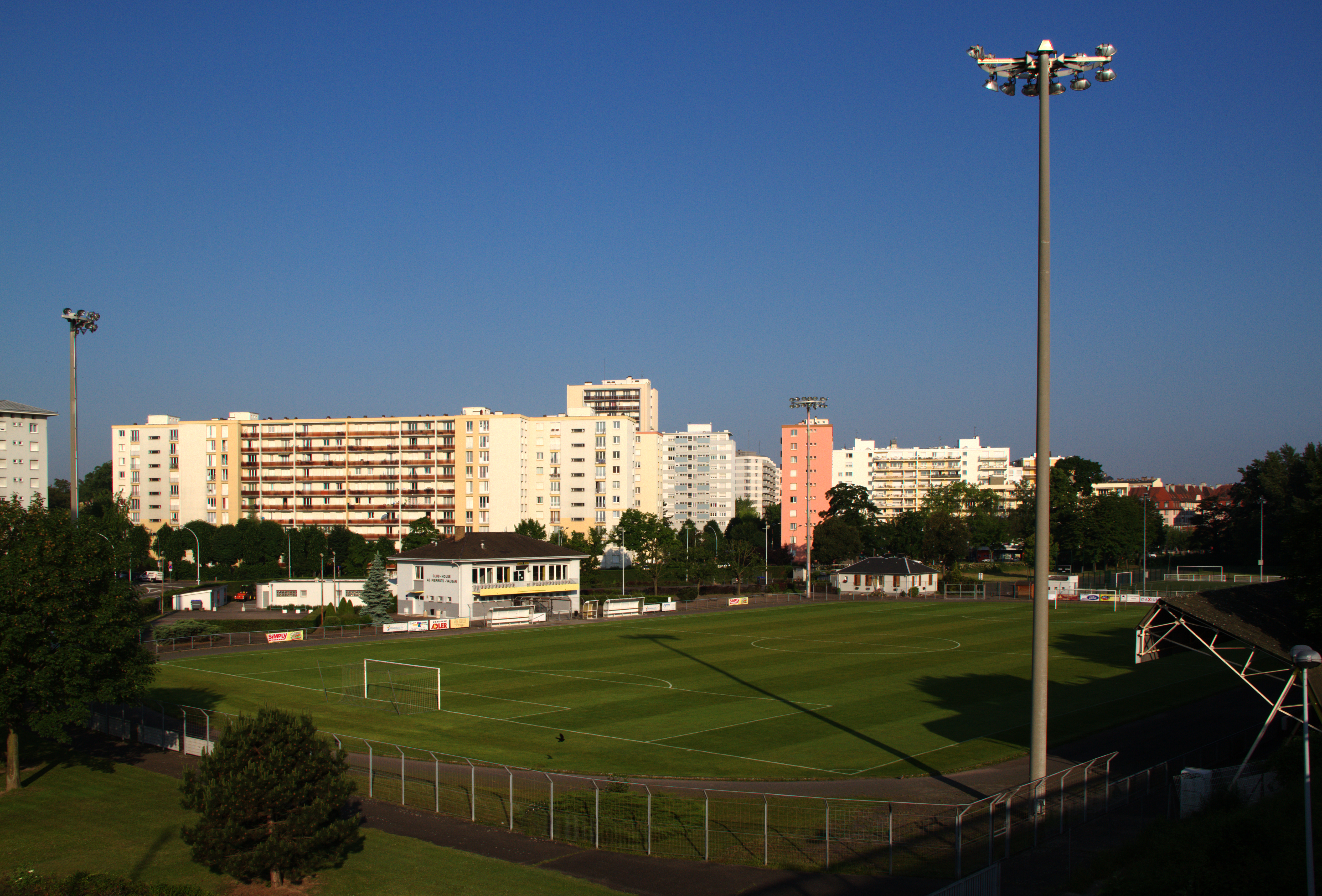 Le stade Émile-Stahl est un stade situé sur la commune de Strasbourg. D'une capacité de 3 000 places, son club résident est l'Association sportive Pierrots Vauban de Strasbourg, un club de CFA 2 relégué pour la saison 2011-2012 en division d'honneur. Il a été inauguré par le maire de Strasbourg Roland Ries le 8 août 2009.